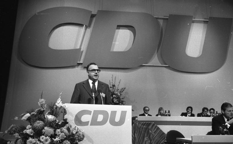 22. Bundesparteitag der CDU in Hamburg 18.-20.11.1973